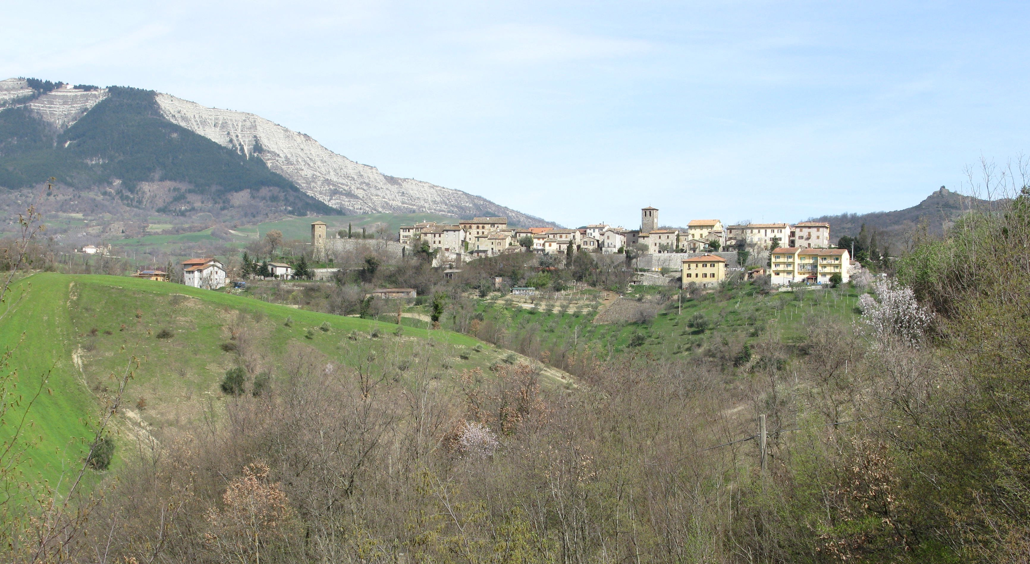 Panorama di Frontino.